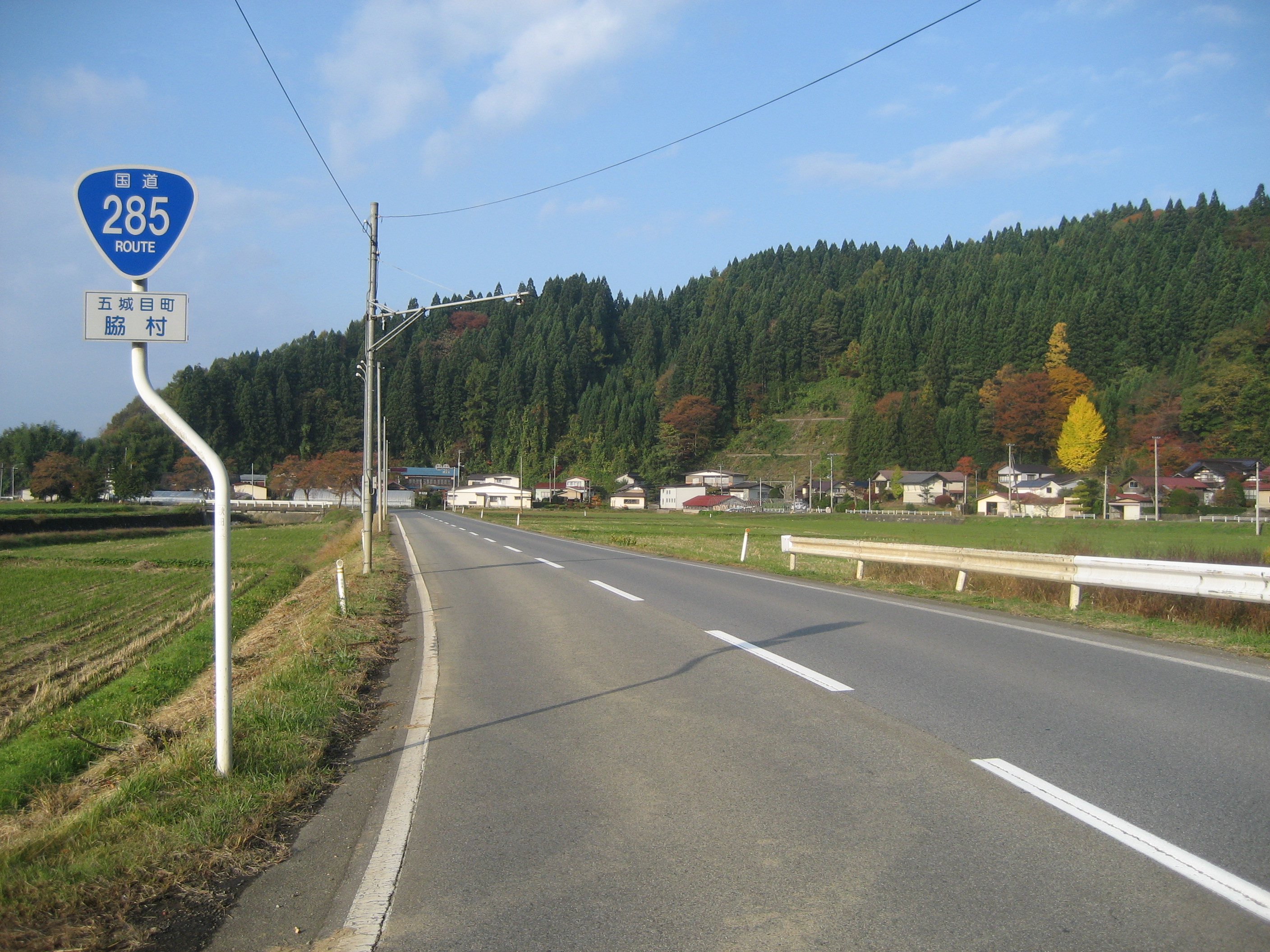 国道285号線秋田県五城目町脇村付近